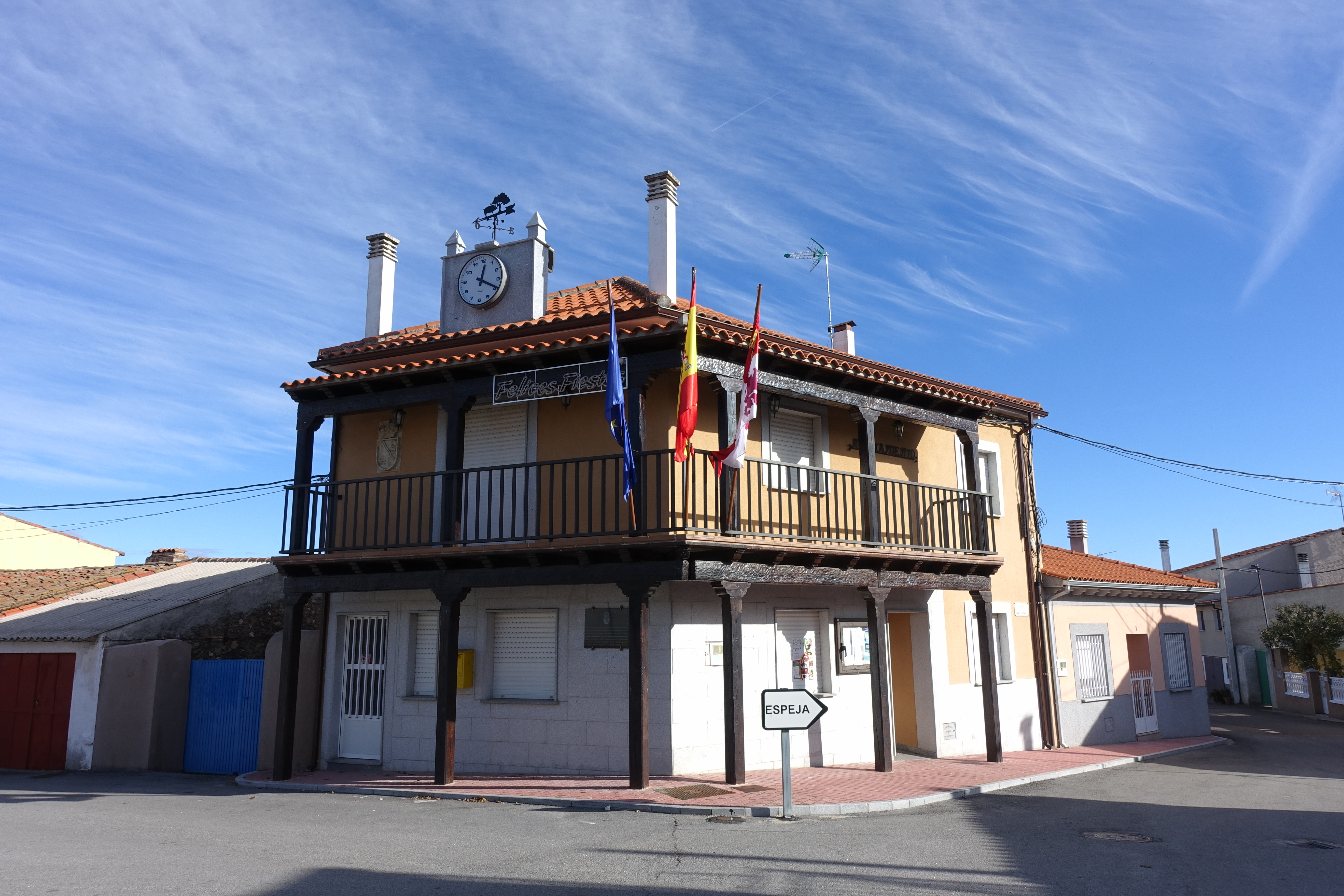 Casa consistorial de Campillo de Azaba (Salamanca, España).